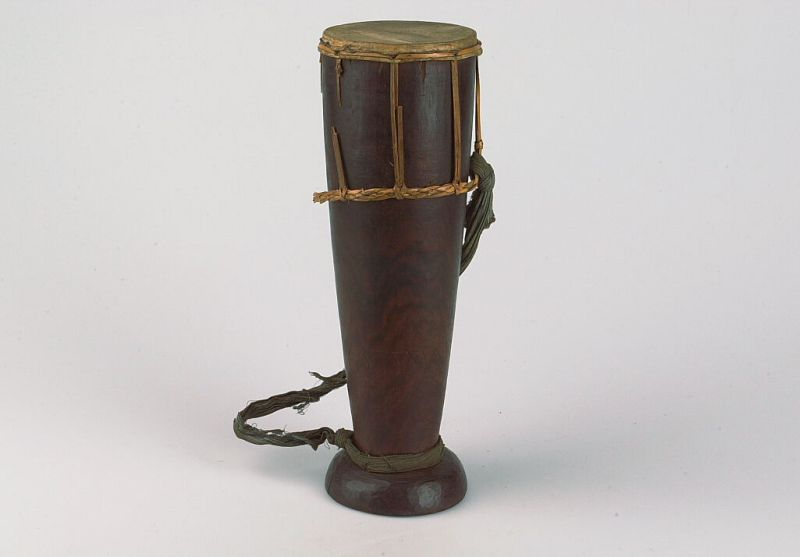 Slaginstrument. Enkelvellige bekervormige trom